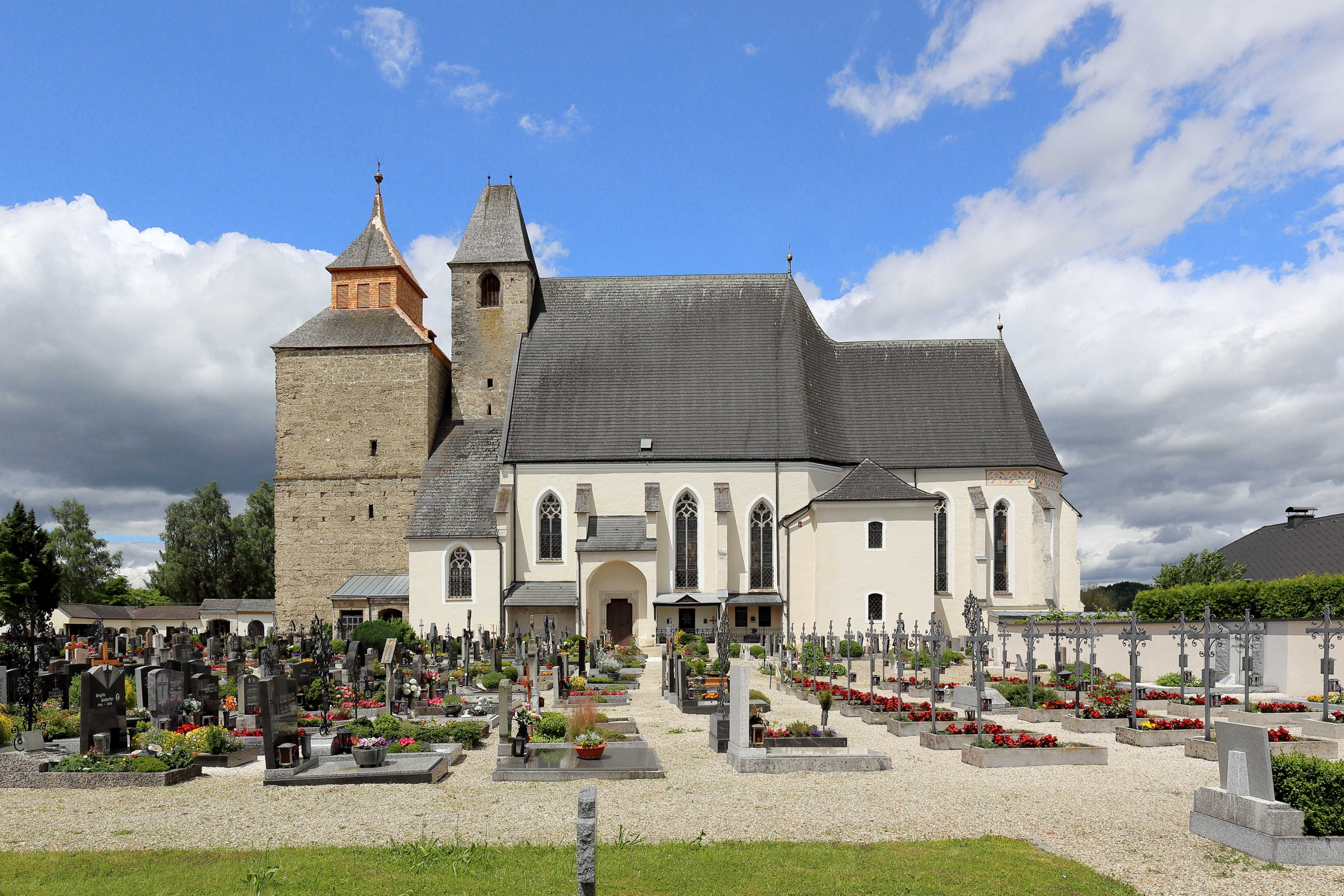 Südansicht der Schöndorfer Kirche in der oberösterreichischen Stadt Vöcklabruck.Die Kirche wurde auf einem Höhenplateau im ältesten Teil der Stadt errichtet und war bis 1785 auch Pfarrkirche der Stadt. Charakteristisch für dieses 824 erstmals urkundlich erwähnte Bauwerk sind die beiden ungleichen Türme.Der zweijochige gotische Chor, um 1400 errichtet, ist einschiffig und hat einen 5/8-Schluss. Das zweischiffige und vierjochige Langhaus wurde unter Einbeziehung älterer Bauteile von 1450 bis 1476 gebaut. Zu Beginn des 16. Jahrhunderts wurde der mächtige Westturm, der nie seine vorgesehene Höhe erreichte, angebaut. Der schmächtigere Turm sollte geschleift und die dadurch entstandene Lücke mittels Verlängerung des Langhauses zum mächtigen Westturm geschlossen warden.